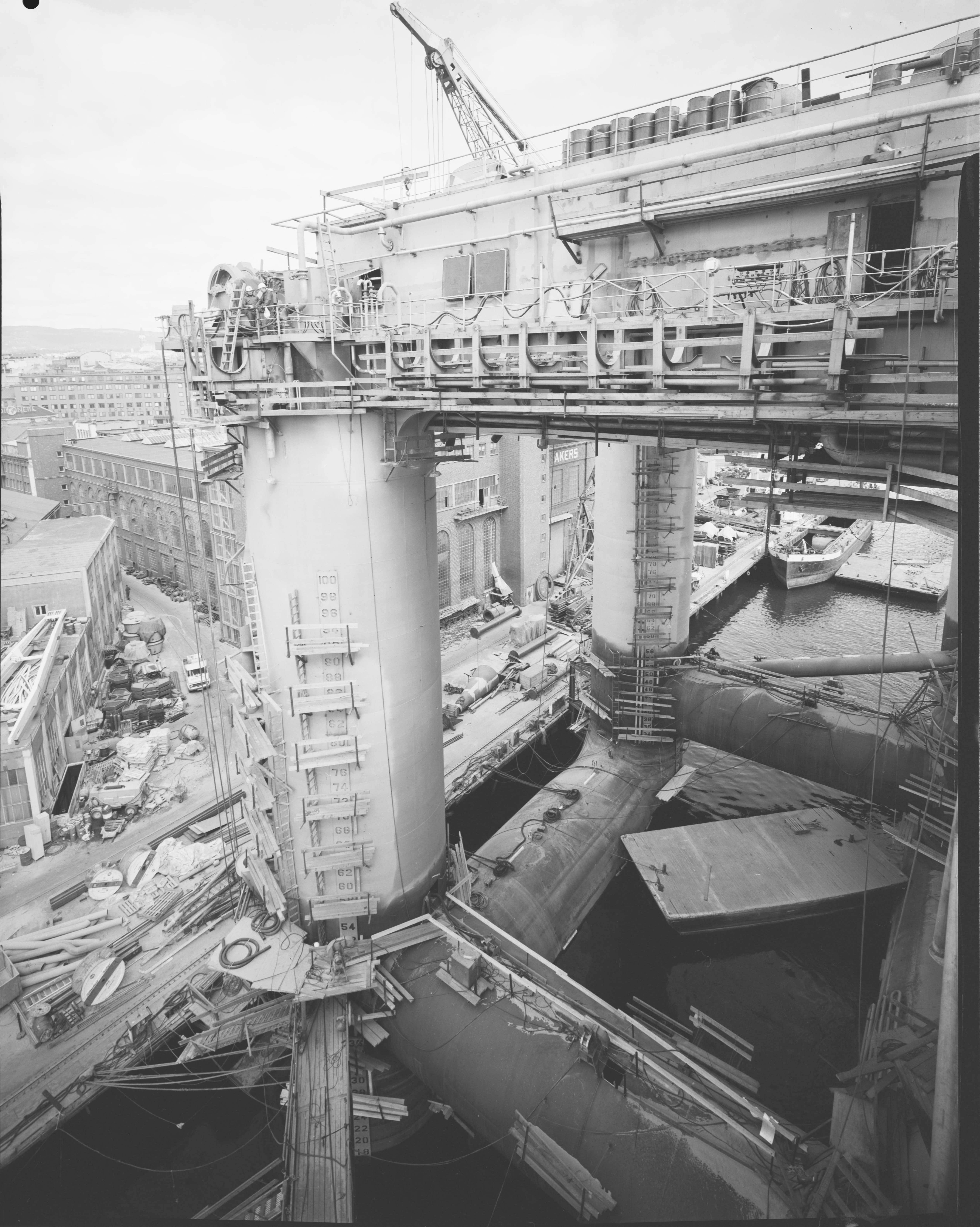 Bildet er hentet fra Nasjonalbibliotekets bildesamling